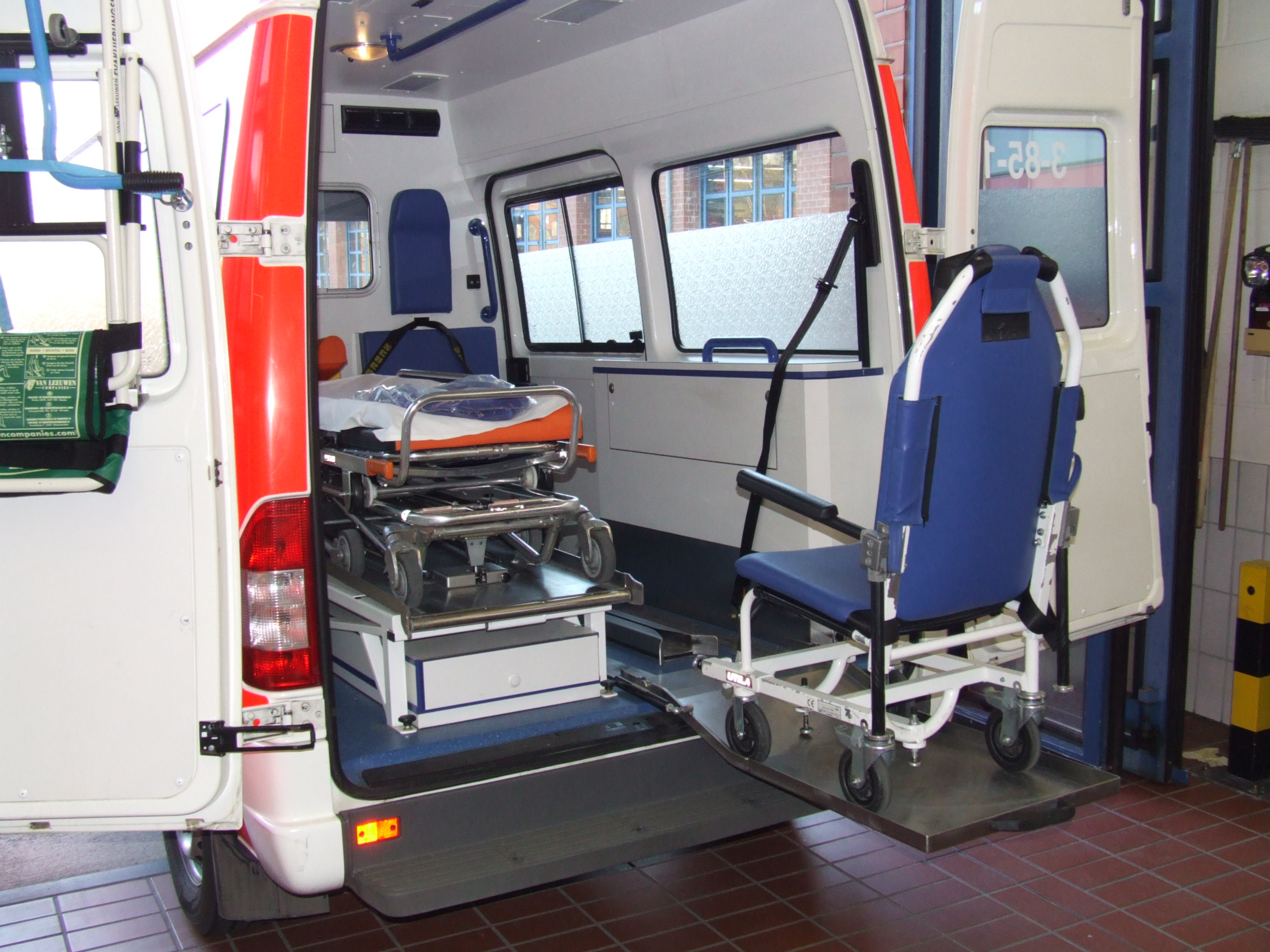 Ansicht eines Tragestuhls - Hier auf der bisher üblichen Klappe positioniert, die mittlerweile jedoch immer häufiger von kleinen, ausklappbaren Rampen abgelöst wird.